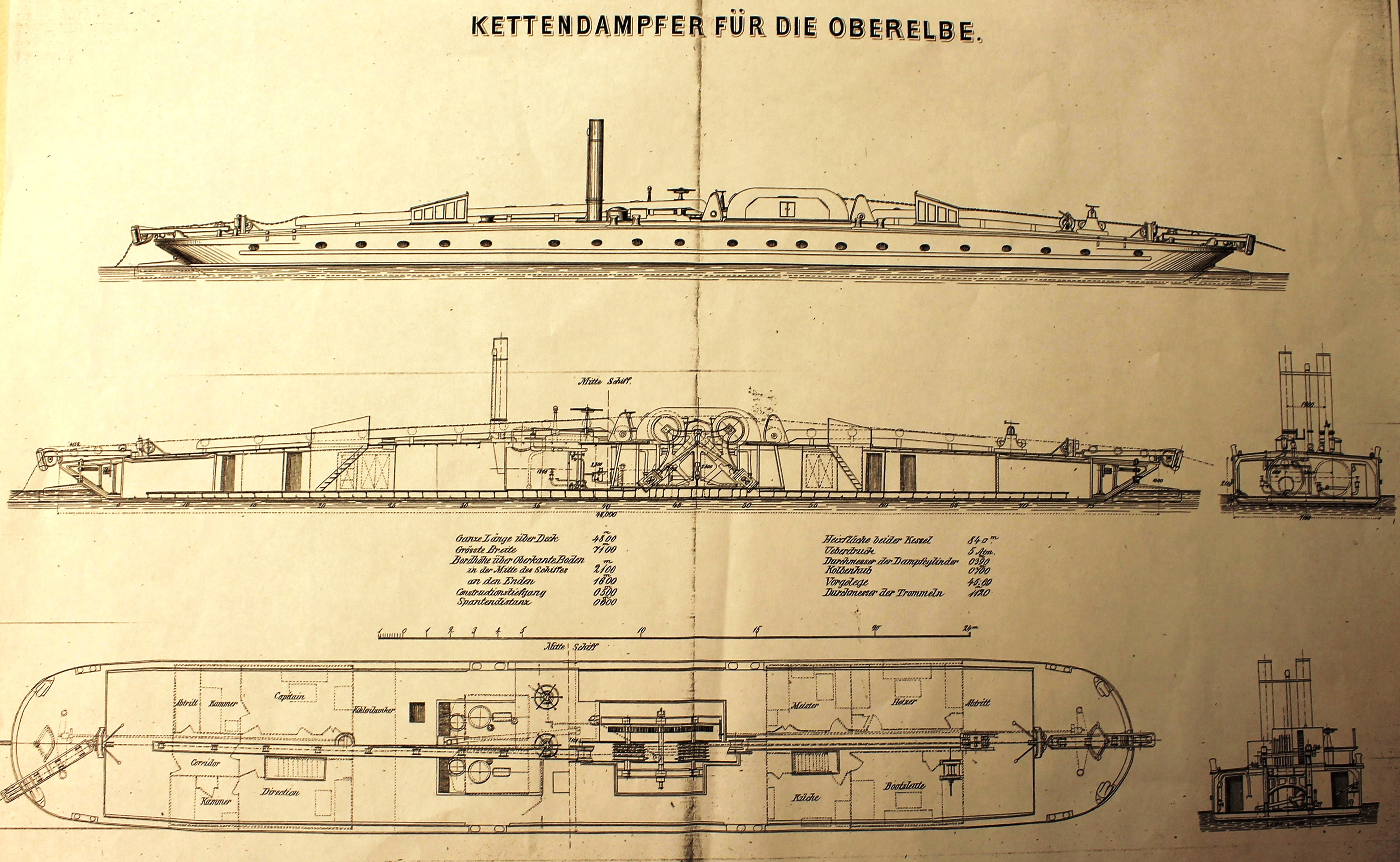 Zeichnung eines Kettendampfers der Oberelbe